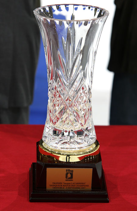 Trophée Jacques Lacarriére - Match des Champions